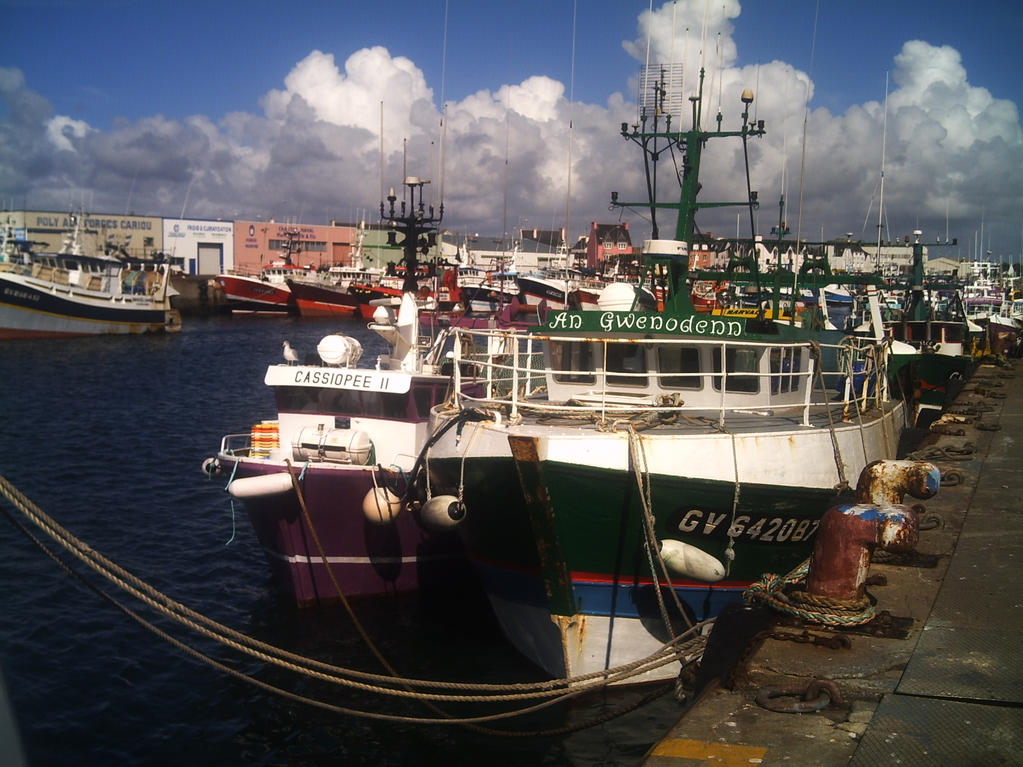 Port du Guilvinec AN GWENODENN GV 642087 Longueur : 15,30 m Largeur : 5,47 m Construit en 1985 - cassé 2009 Moteur Baudouin 6 M26 SR 272 KW réducteur caterpillar CASSIOPEE II GV 513361 CONSTRUIT EN 1981 12.21m X 4.60m